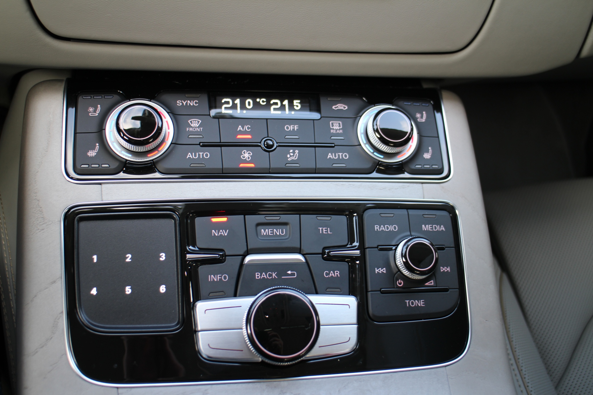 Facelift